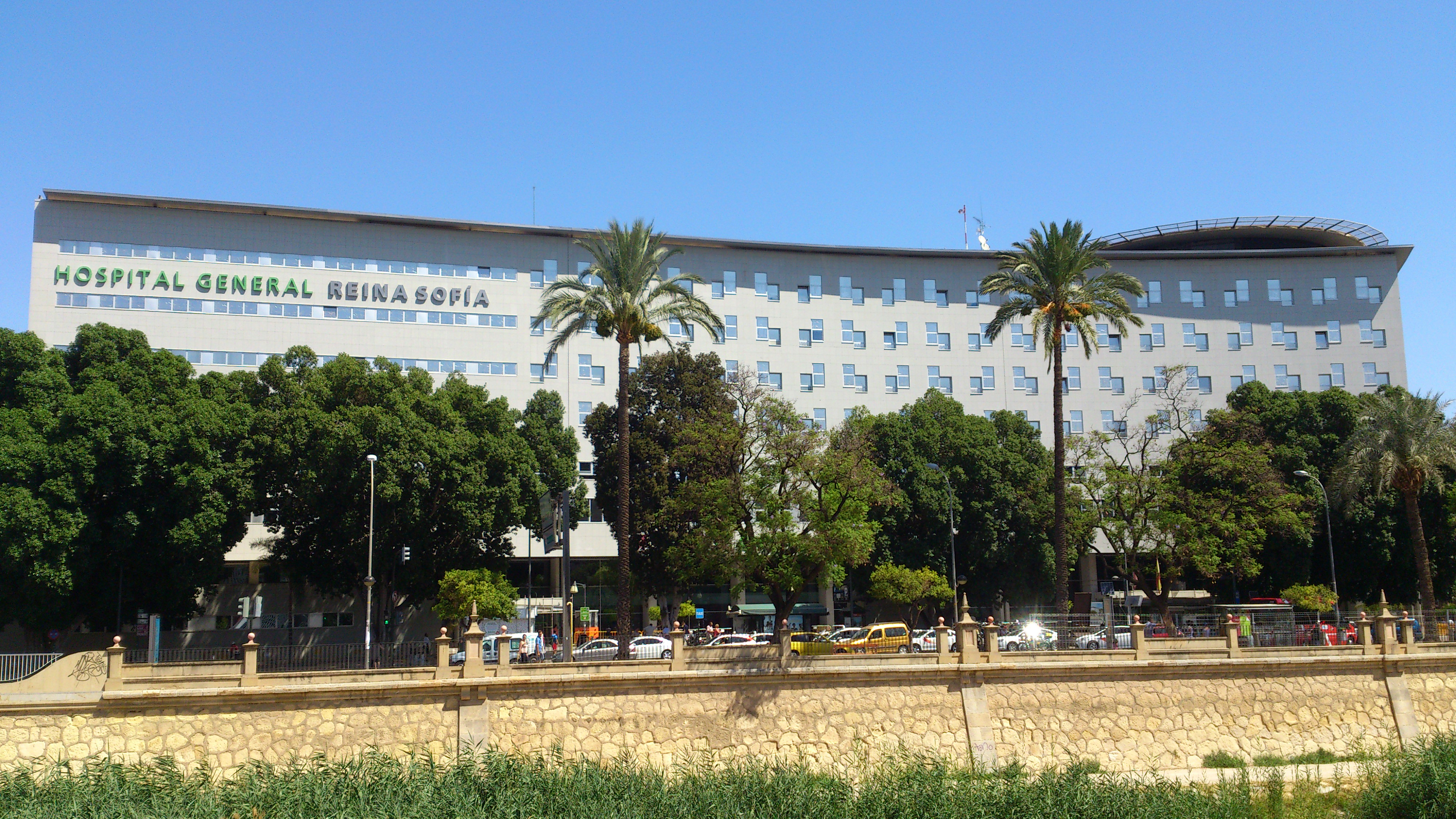 Hospital General Reina Sofia, Murcia, España